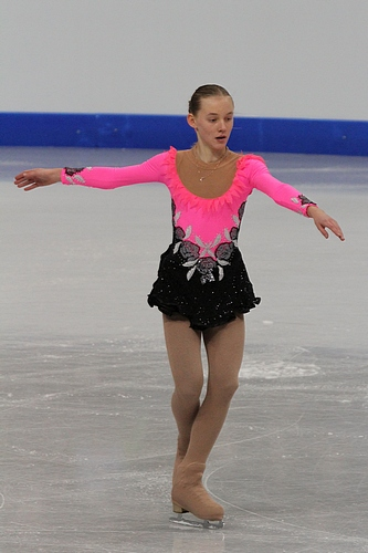 Елизавета Уколова (Чехия) на чемпионате мира по фигурному катанию среди юниоров 2012